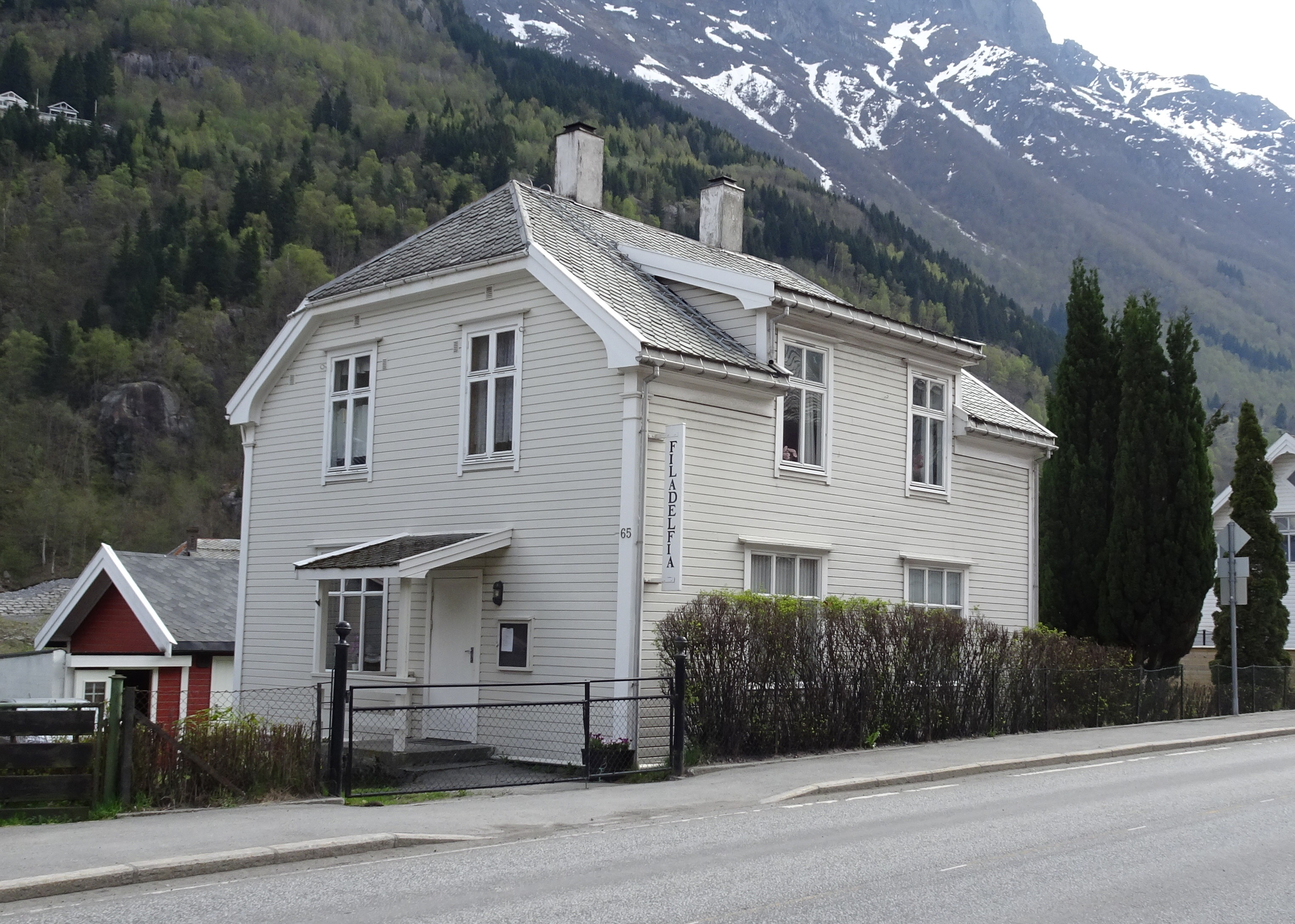 Filadelfia Odda